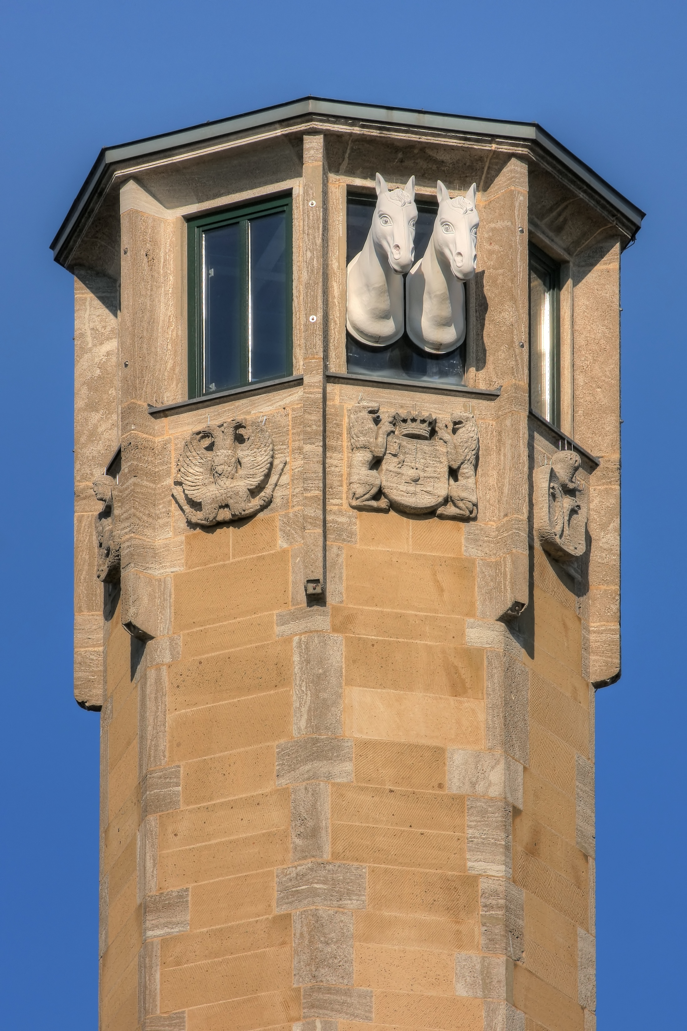 Richmodisturm. Richmodstraße, 50667 Köln.